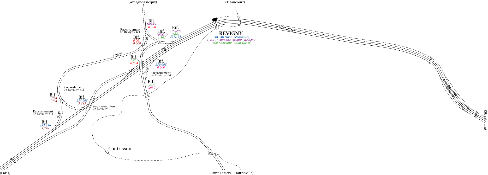 Schéma du complexe ferroviaire de Revigny (FR-55)